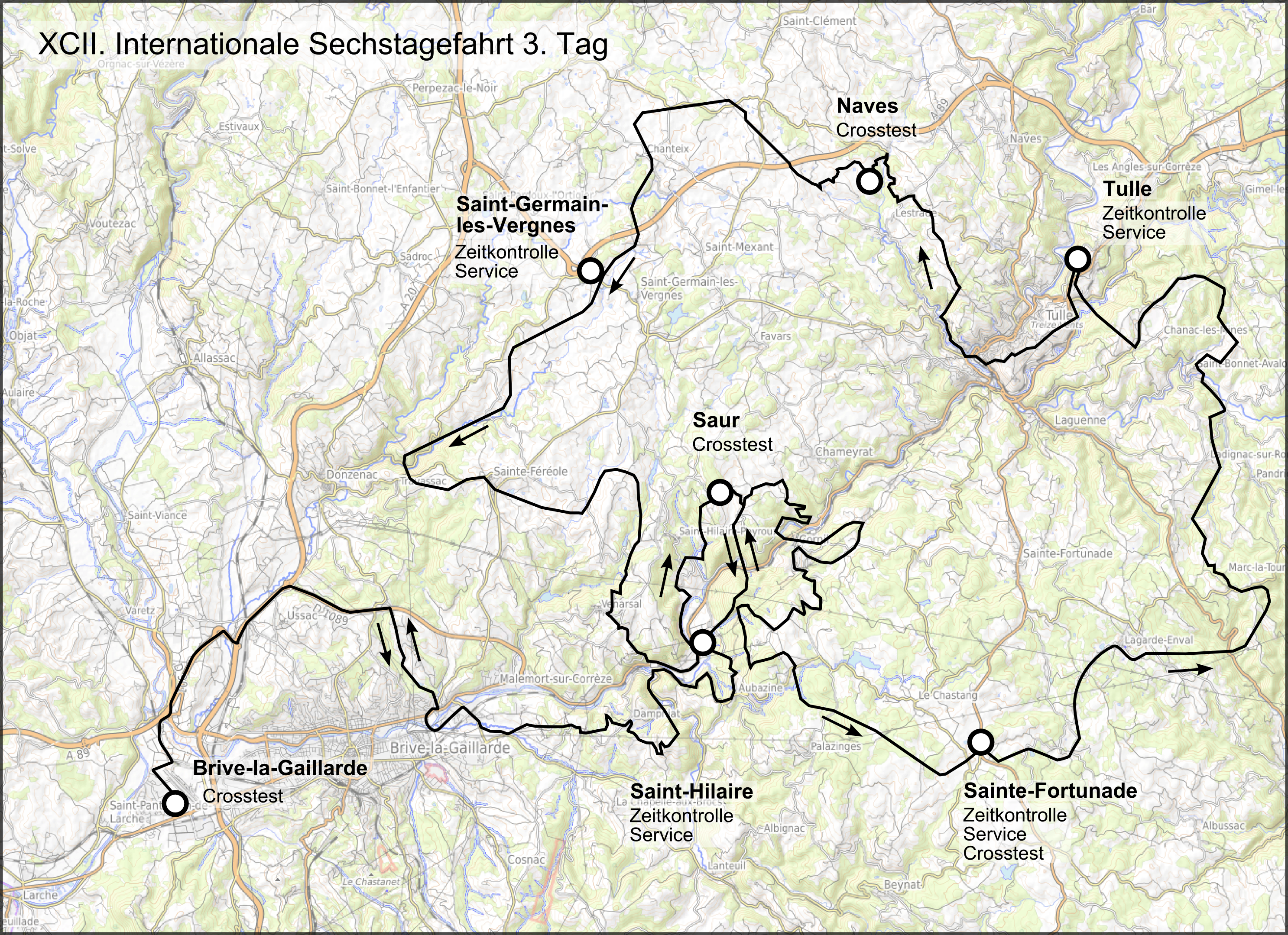 Karte der 92. Internationale Sechstagefahrt, Route des 3. Tages